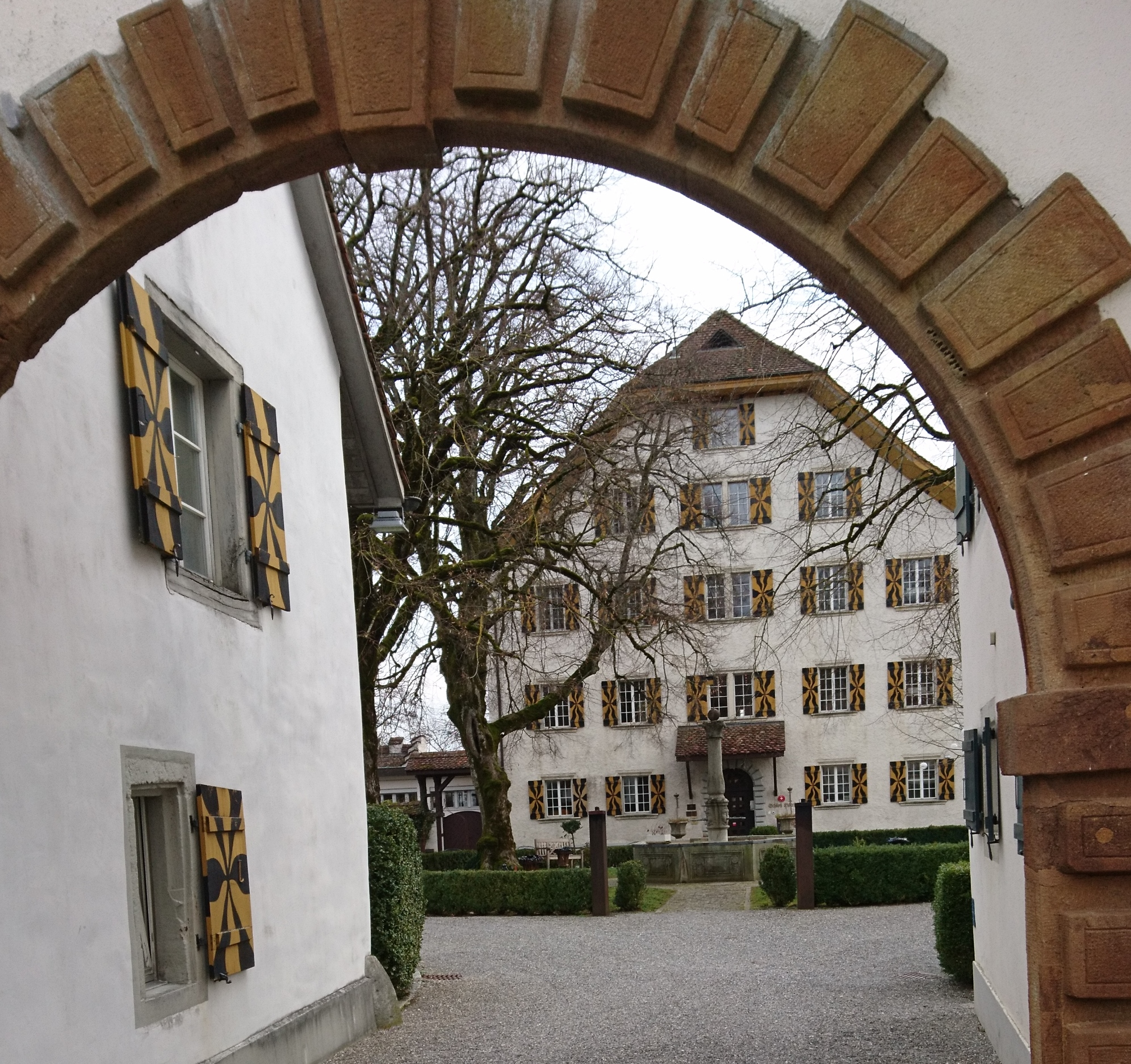 Eingang zu Schloss Böttstein 2018-01-31